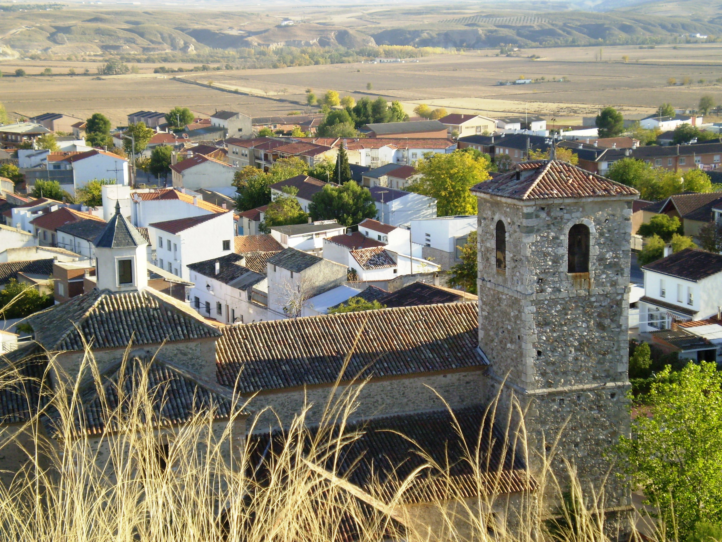 Fuentidueña de Tajo view, Community of Madrid, Spain